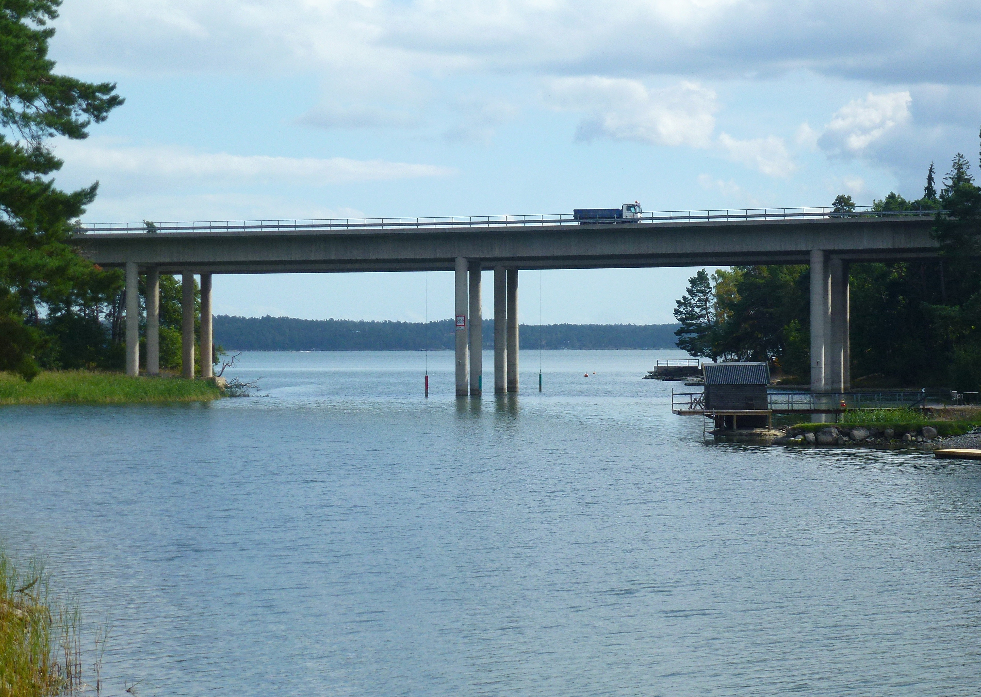 Kilviksbron